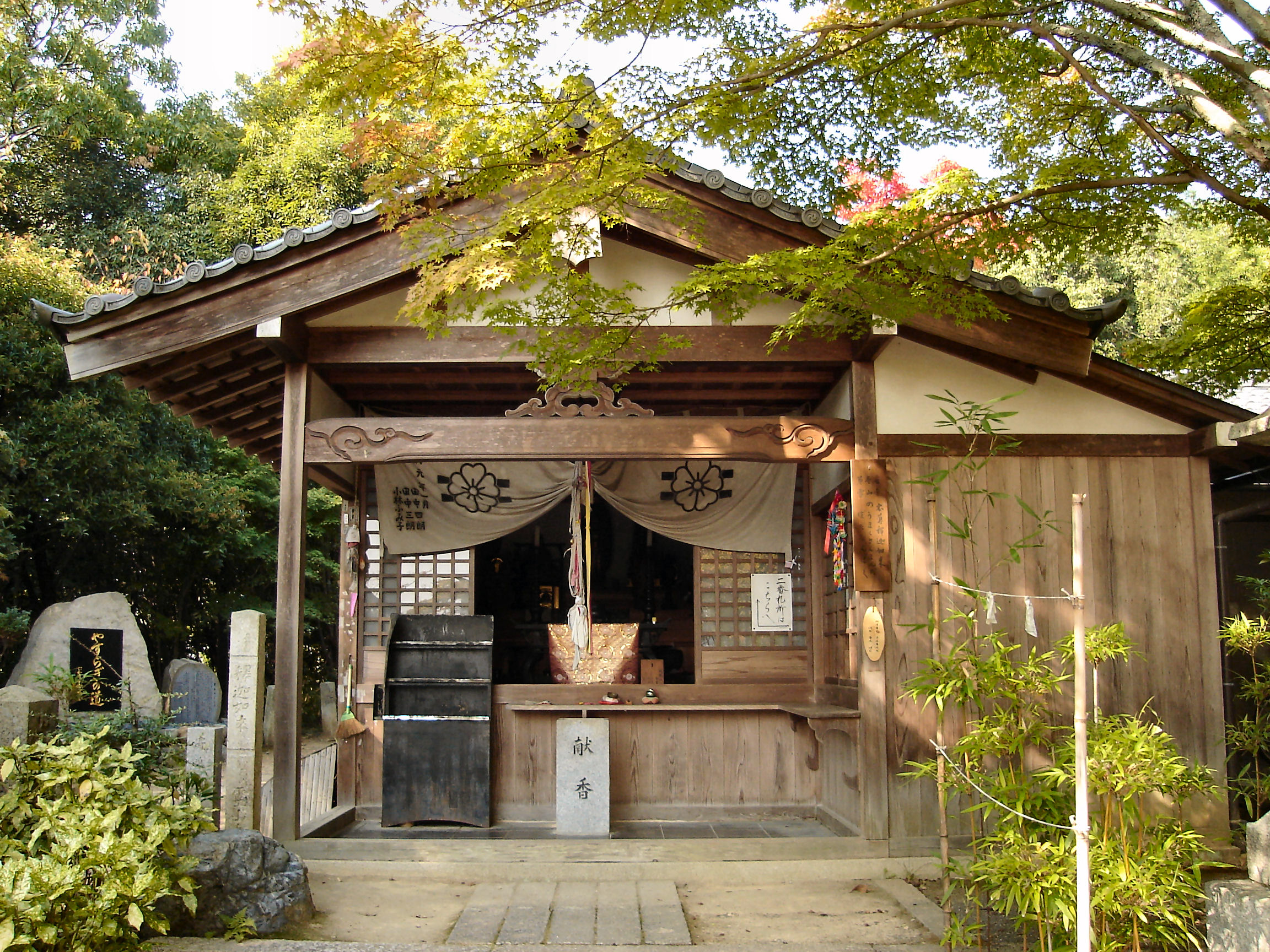 Omuro88kasyo No1 Ryozenji(御室八十八ヶ所 一番 霊山寺)